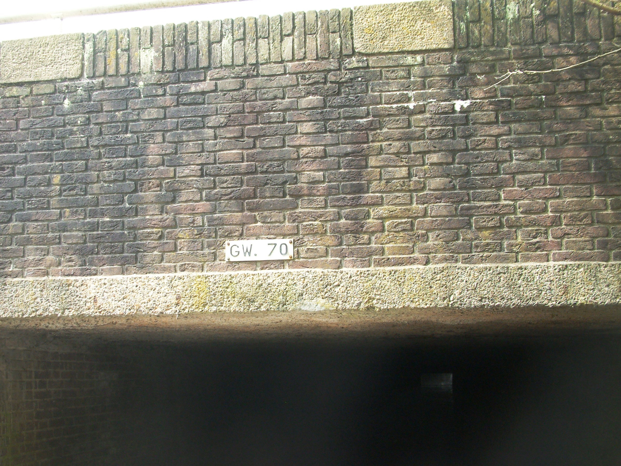 Bridges in The Hague as mentioned in the filename.